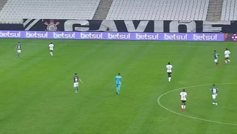 Corinthians e Palmeiras disputam o Derby na Arena Corinthians no primeiro jogo entre os rivais em toda a história sem torcida, em virtude da pandemia.